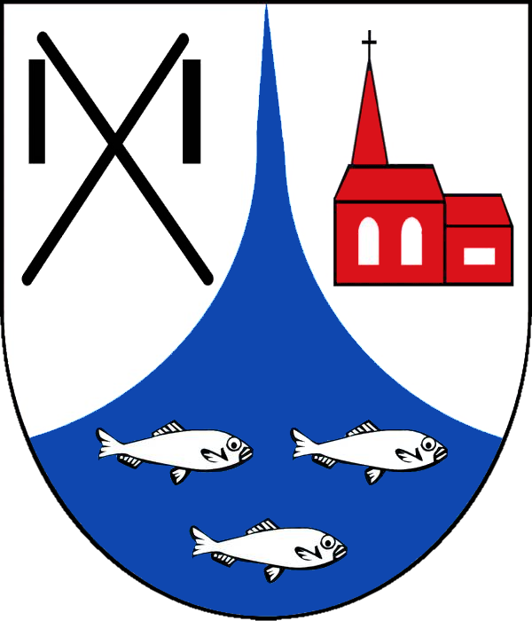 Das Wappen wurde von Helmut Otte (Bürgermeister der Gemeinde Hohen Sprenz von 2004 bis 2009) gestaltet und am 19. Juni 2009 vom Innenministerium Mecklenburg-Vorpommern genehmigt.